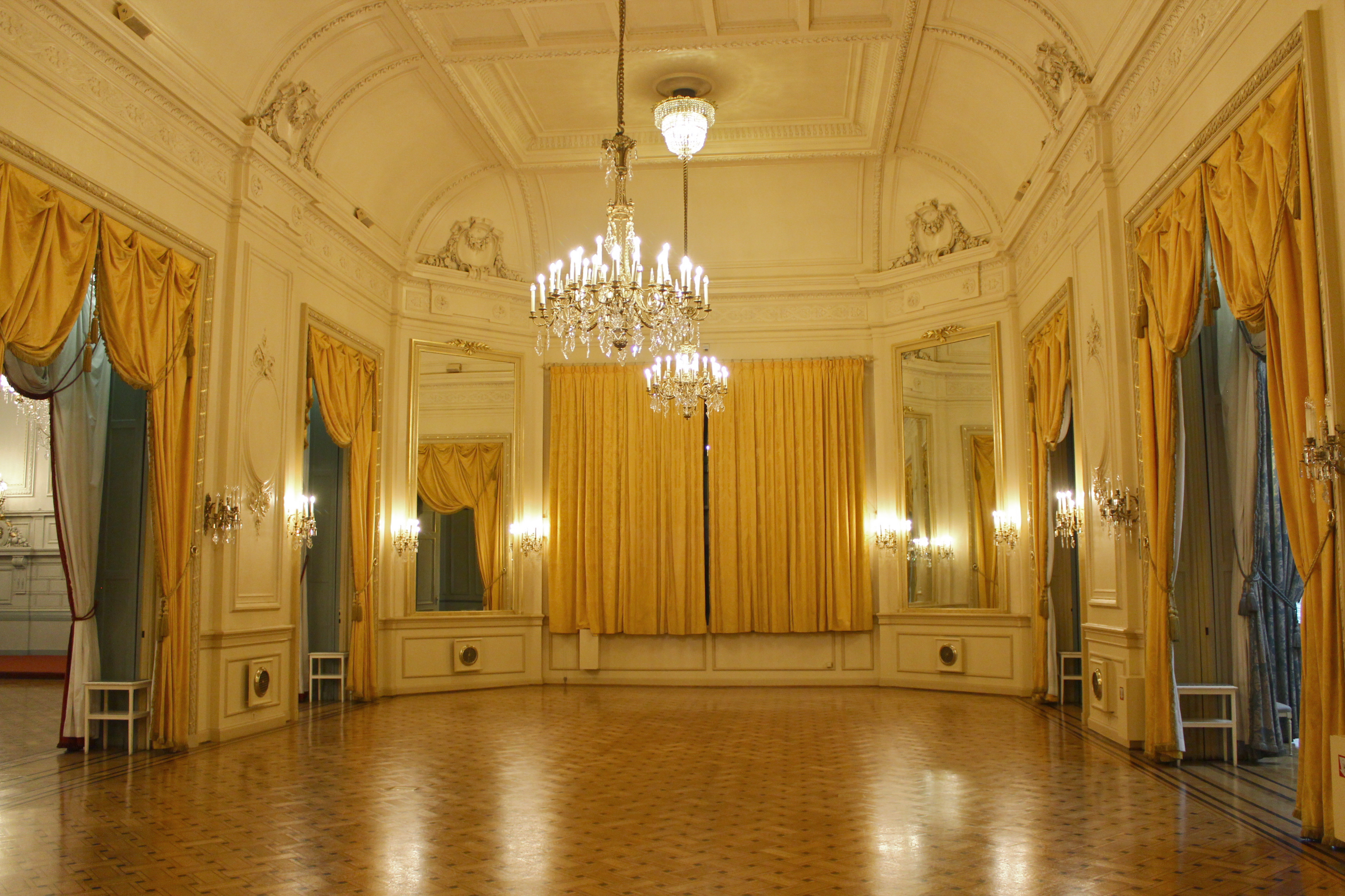 Interieur van het Concert Noble, een neoclassicistisch spektakelzaal, gebouwd 1872-1873 naar plannen van architect Henri Beyaert. De feestzaal.